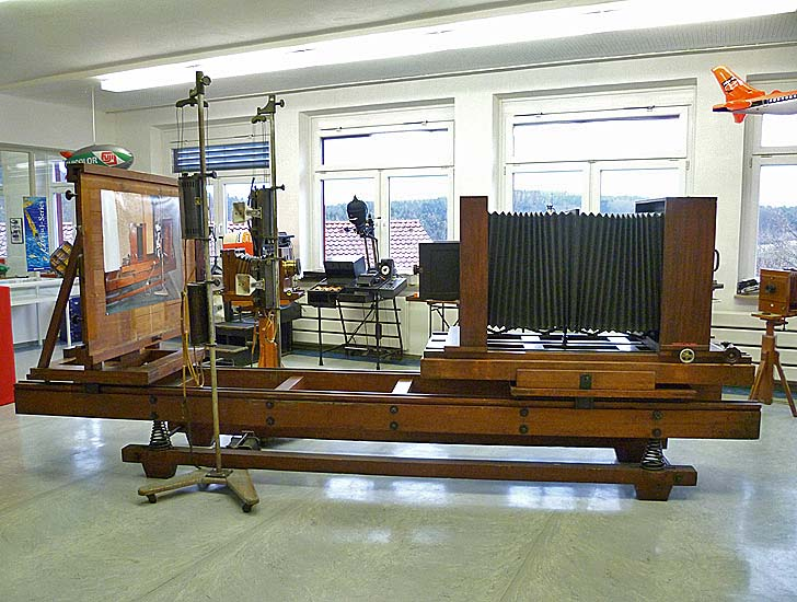 Deutsches Kameramuseum Plech: Reprokamera Falz und Werner